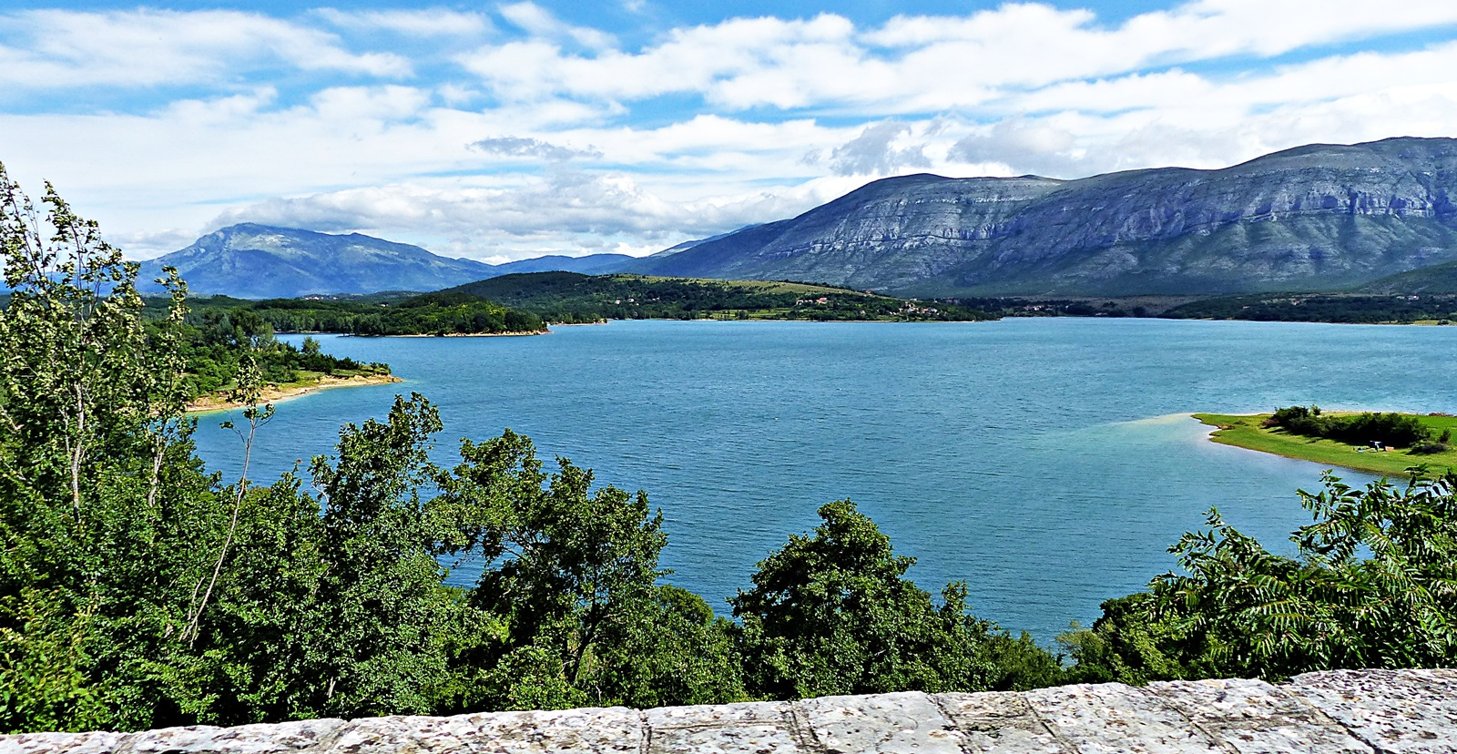 Der Perućko jezero